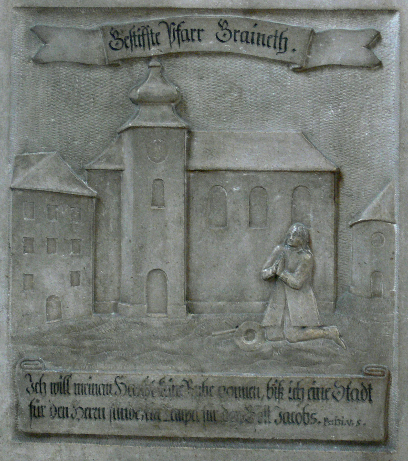 Passau, Stadtpfarrkirche St. Paul Epitaph des Lukas Kern, Detail Text: Gestiffte Pfarr Graineth. Ich will meinem Haubt keine Ruhe gonnen, biß ich eine Stadt für den Herrn finde, ein(?) Tempel für den Gott Jacobs. Ps. 131 V. 5. (Psalm 132 nach heutiger Zählung)